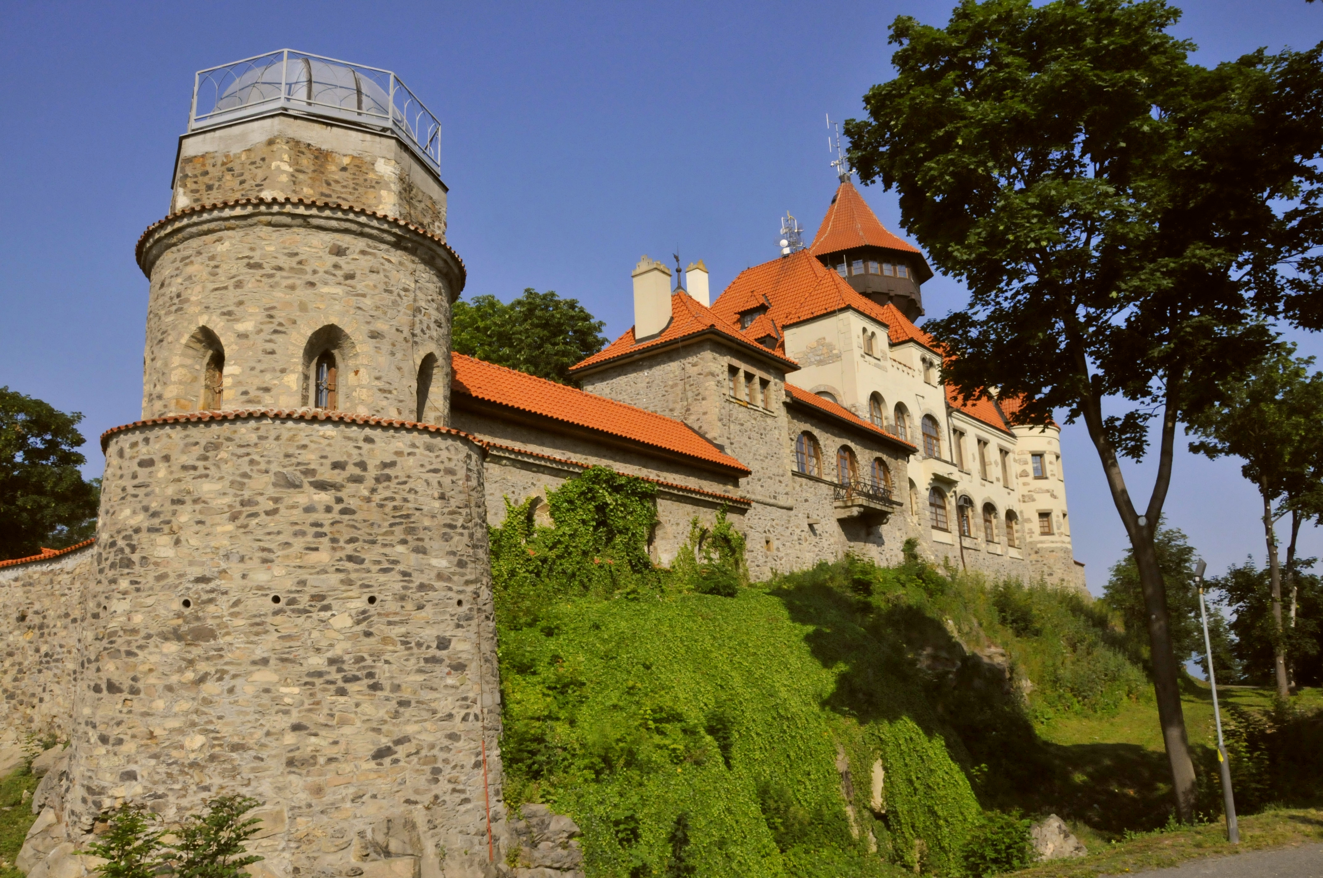 Most, Burg Hněvín, Nordostseite